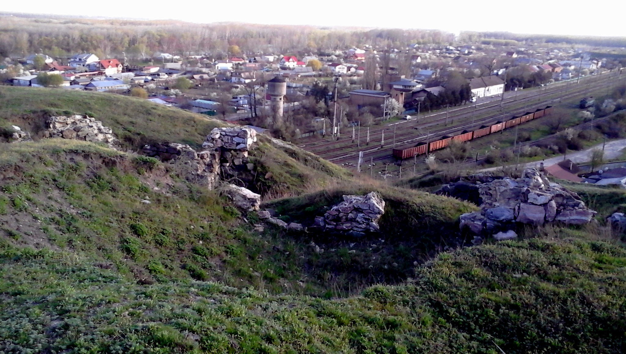 Castellum roman 01